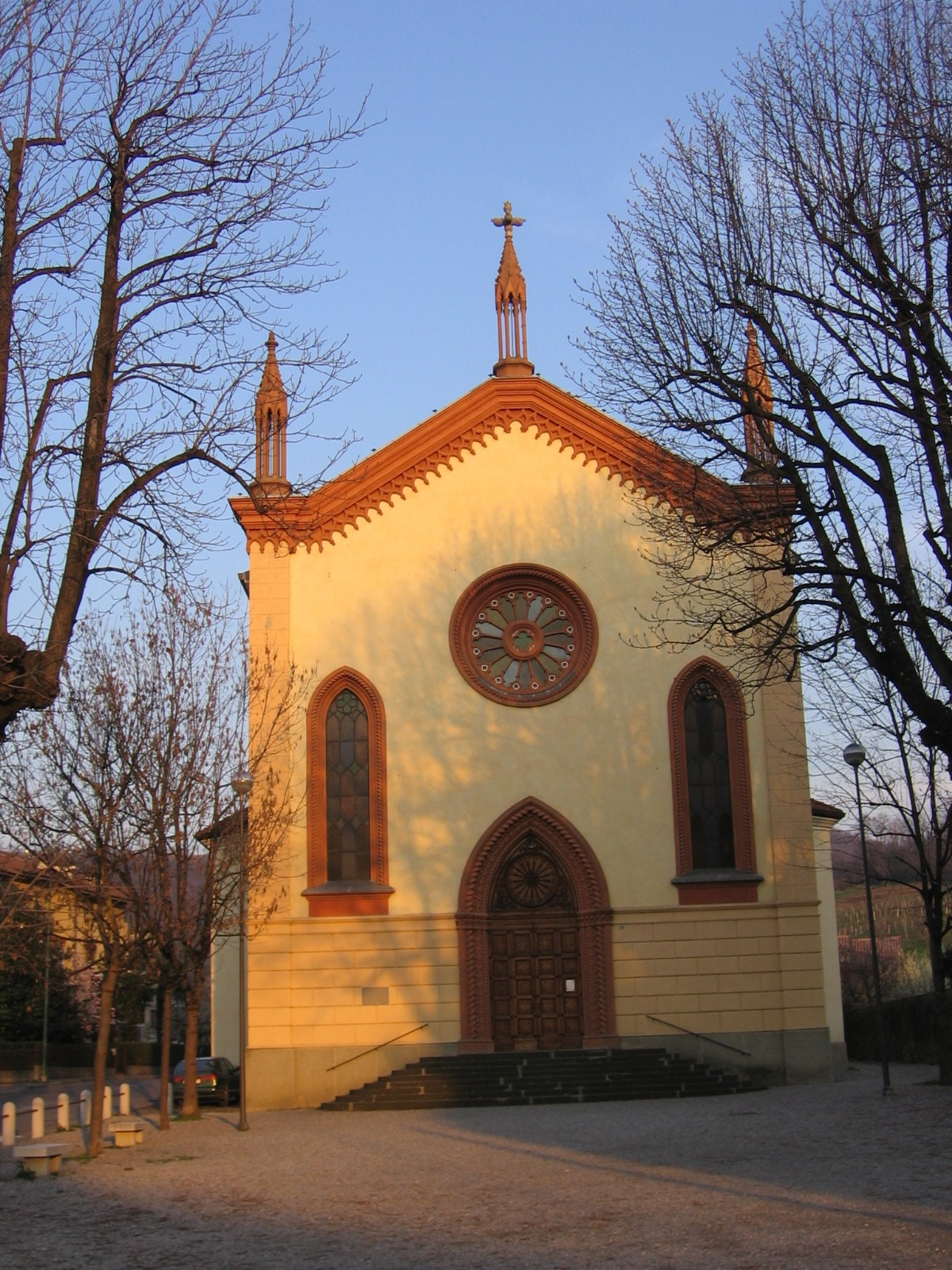 Santuario della Madonna del Buon Consiglio. Villa di Serio (BG), Italia.